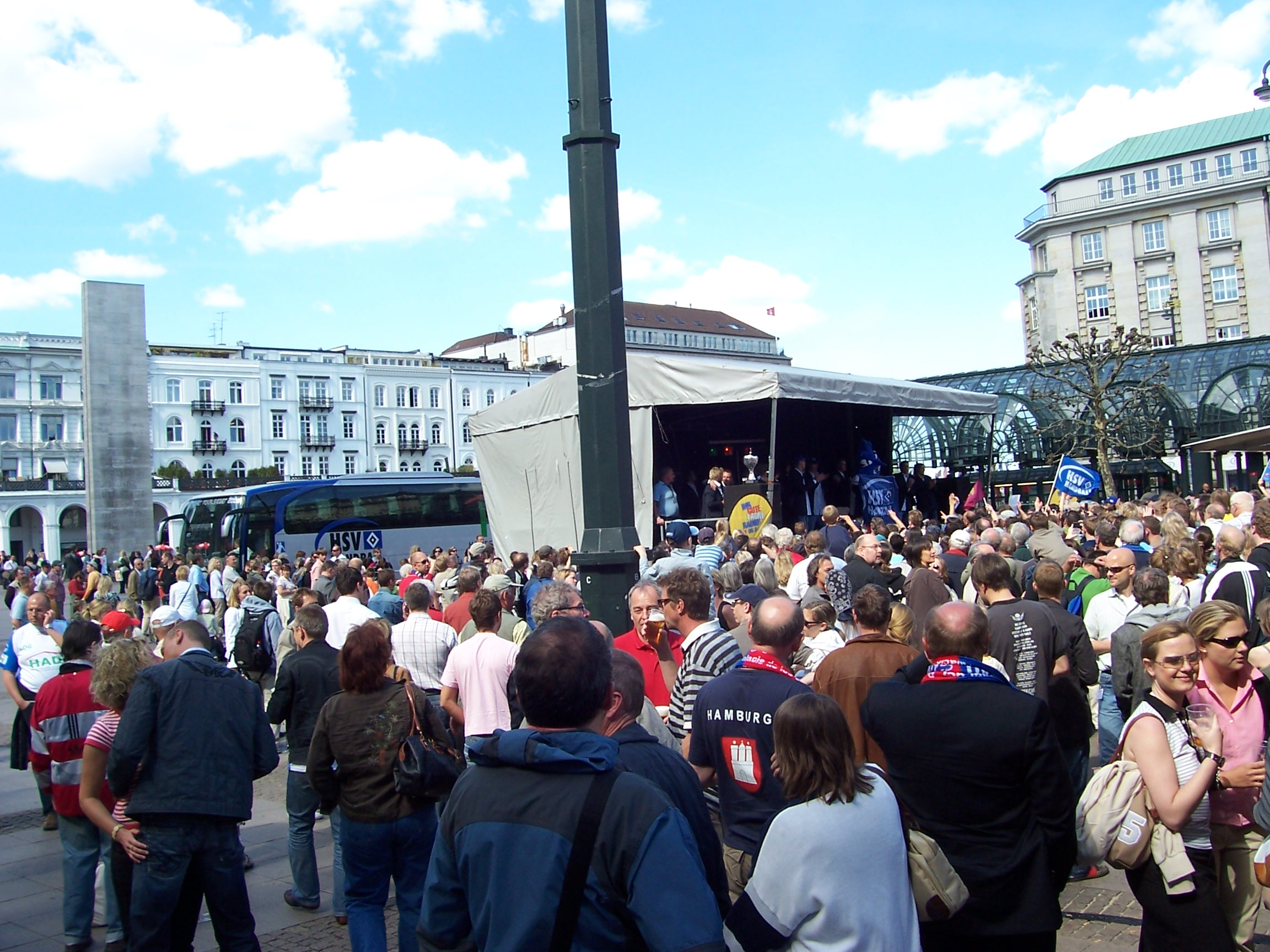 Siegesfeier des HSV zur gewonnenen Europapokalmeisterschaft 2007